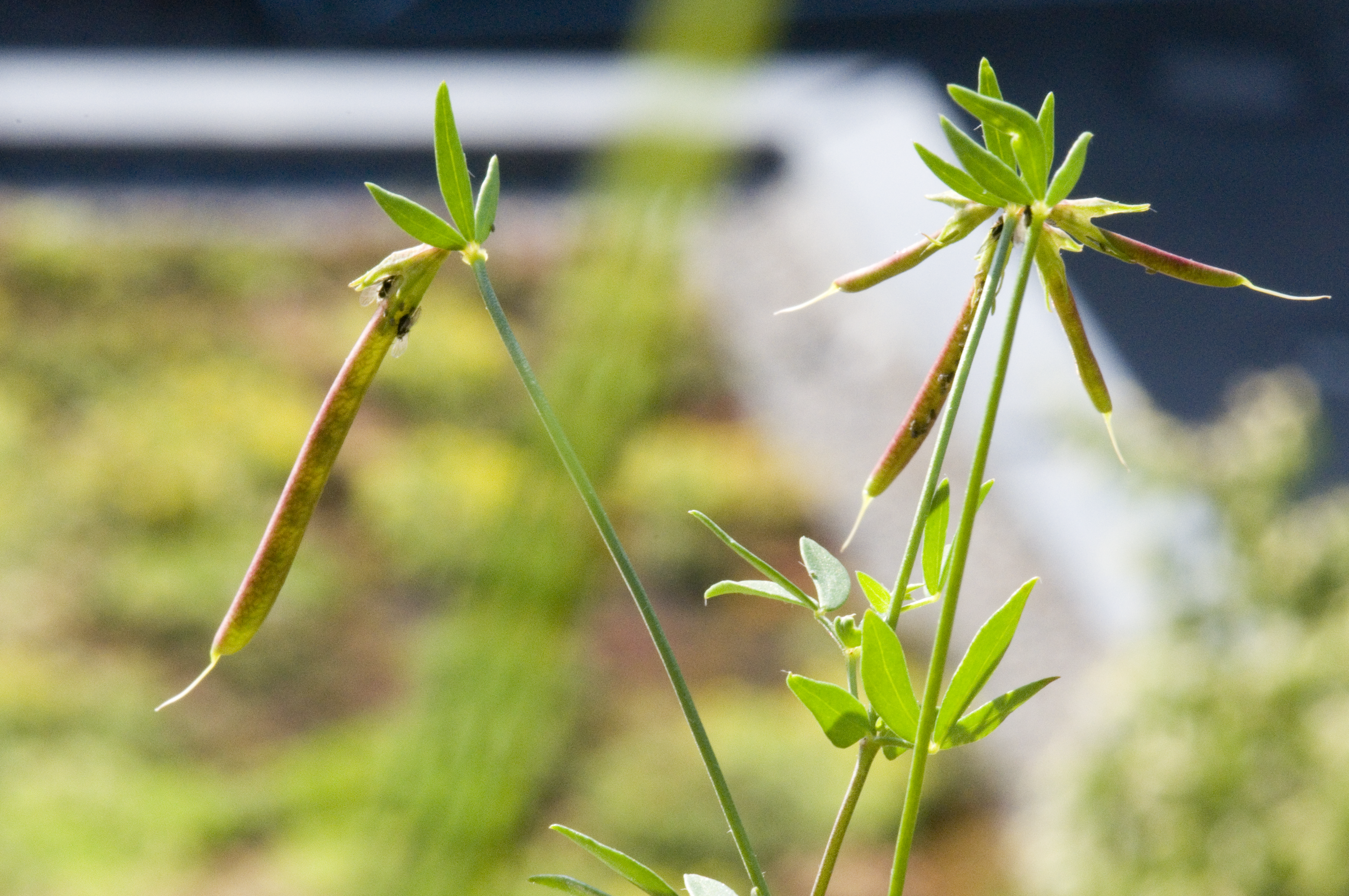 Früchte des Gewöhnlichen Hornklees